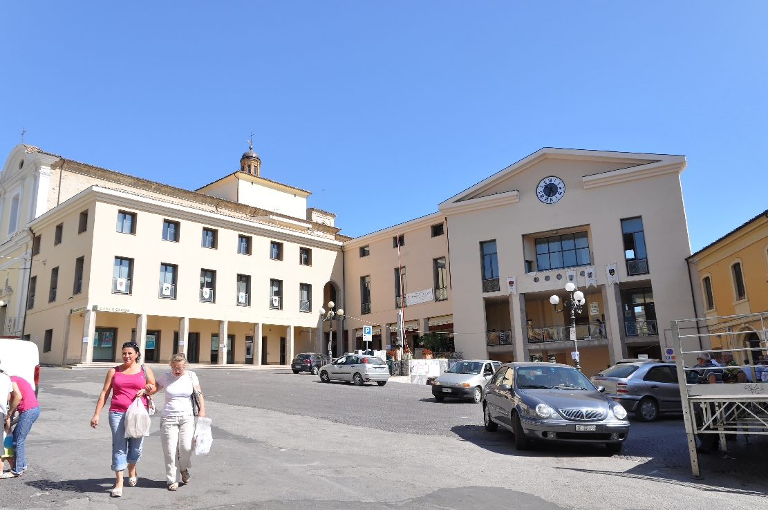 Penne (comune, Italy) 2012